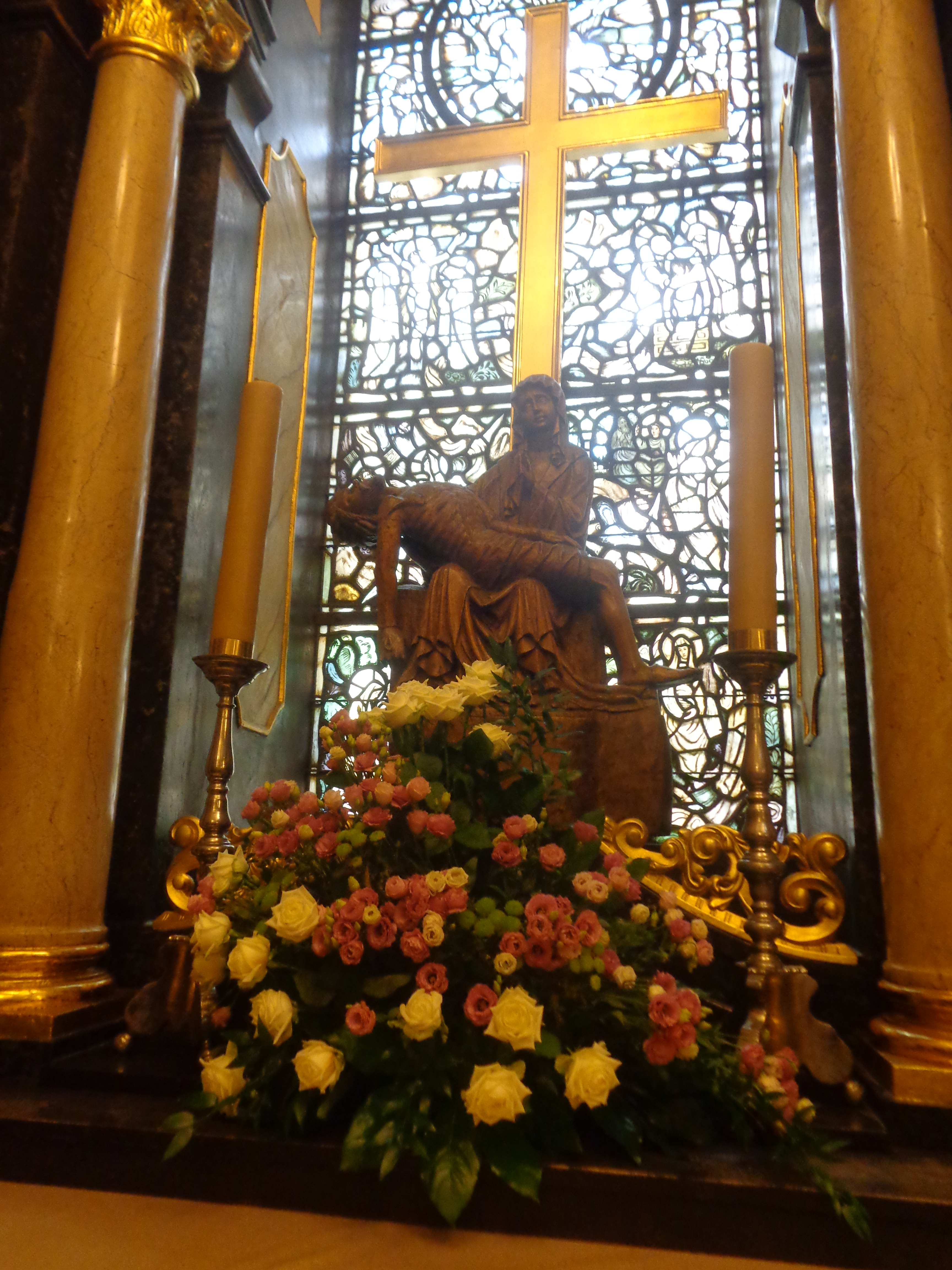 Częstochowa, kaplica pw. NMP, 1430-1460, 1518-1523, 1640-1660, 1930